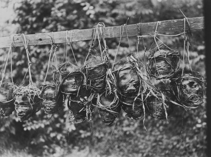 foto. Een plank met door Dajaks gesnelde koppen